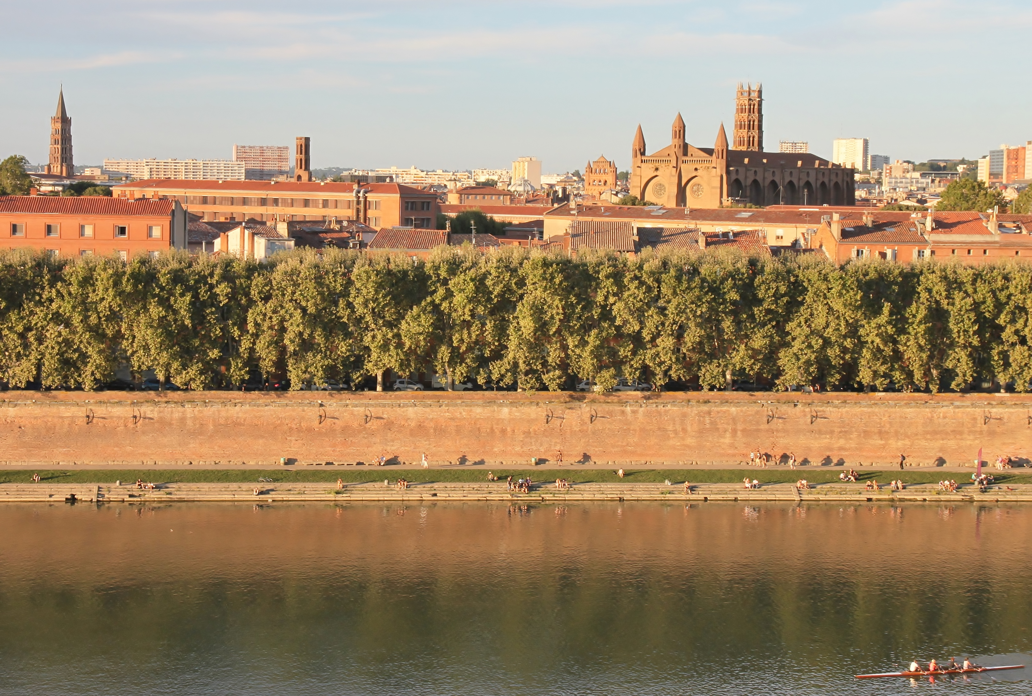 Berges de la Garonne